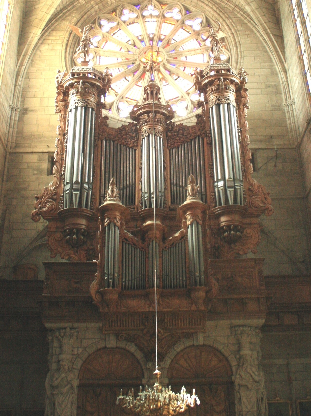 Orgue de la catedral de Béziers